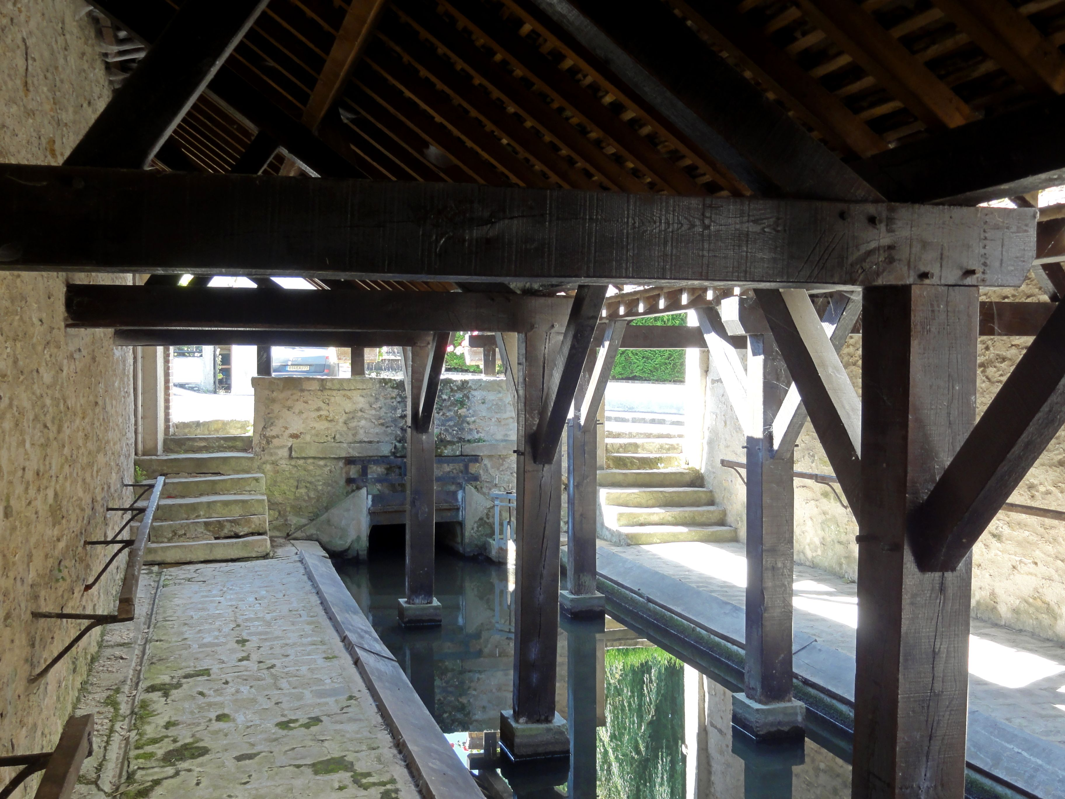 Lavoir.